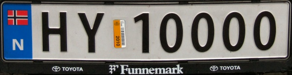 Skilt for hydrogendrevet kjøretøy